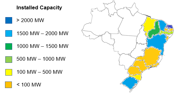 The image contains a map with the installed capacity of wind power per state in Brazil as of 2016.